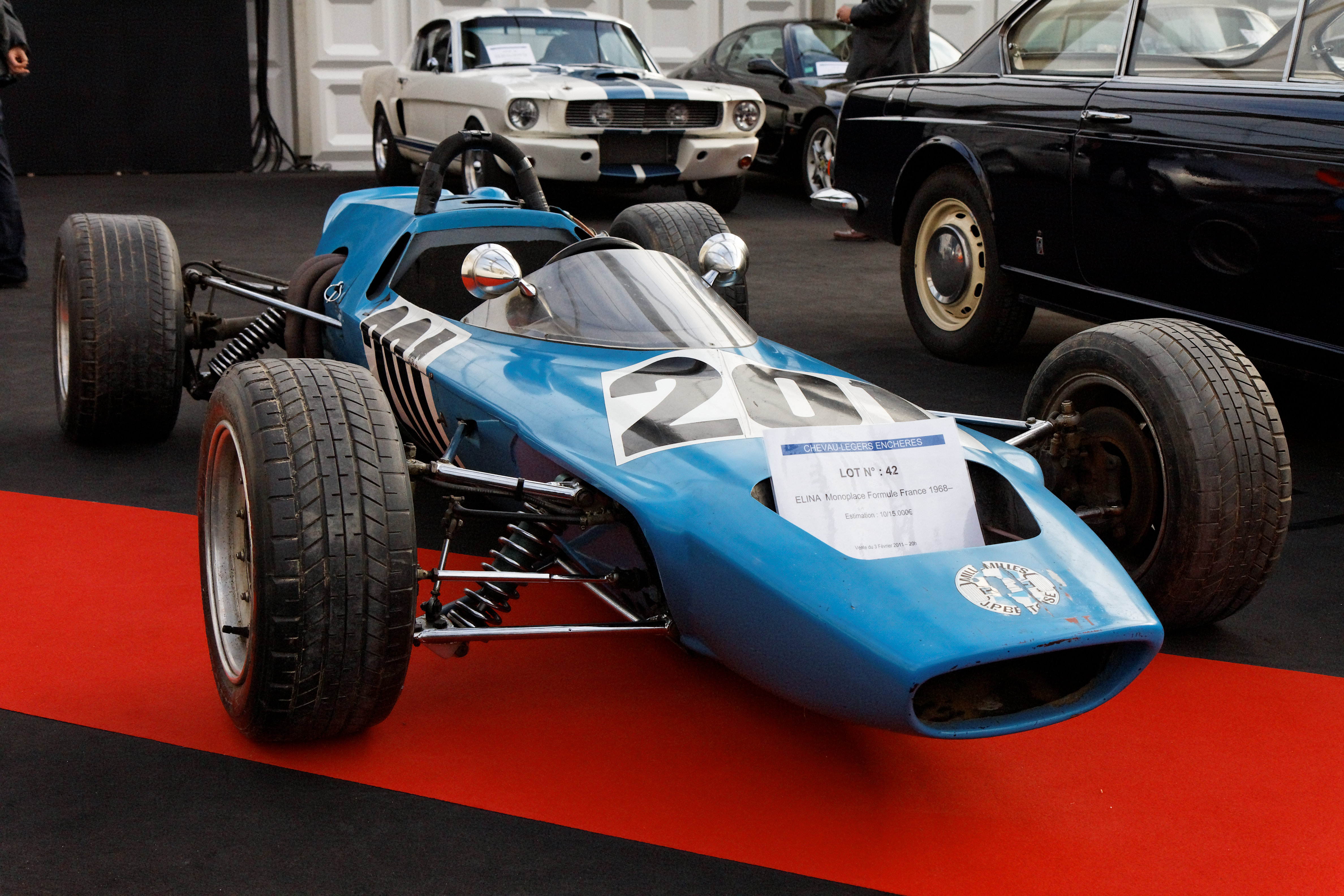 Elina racing car - Festival Automobile International 2011 - Vente aux enchères